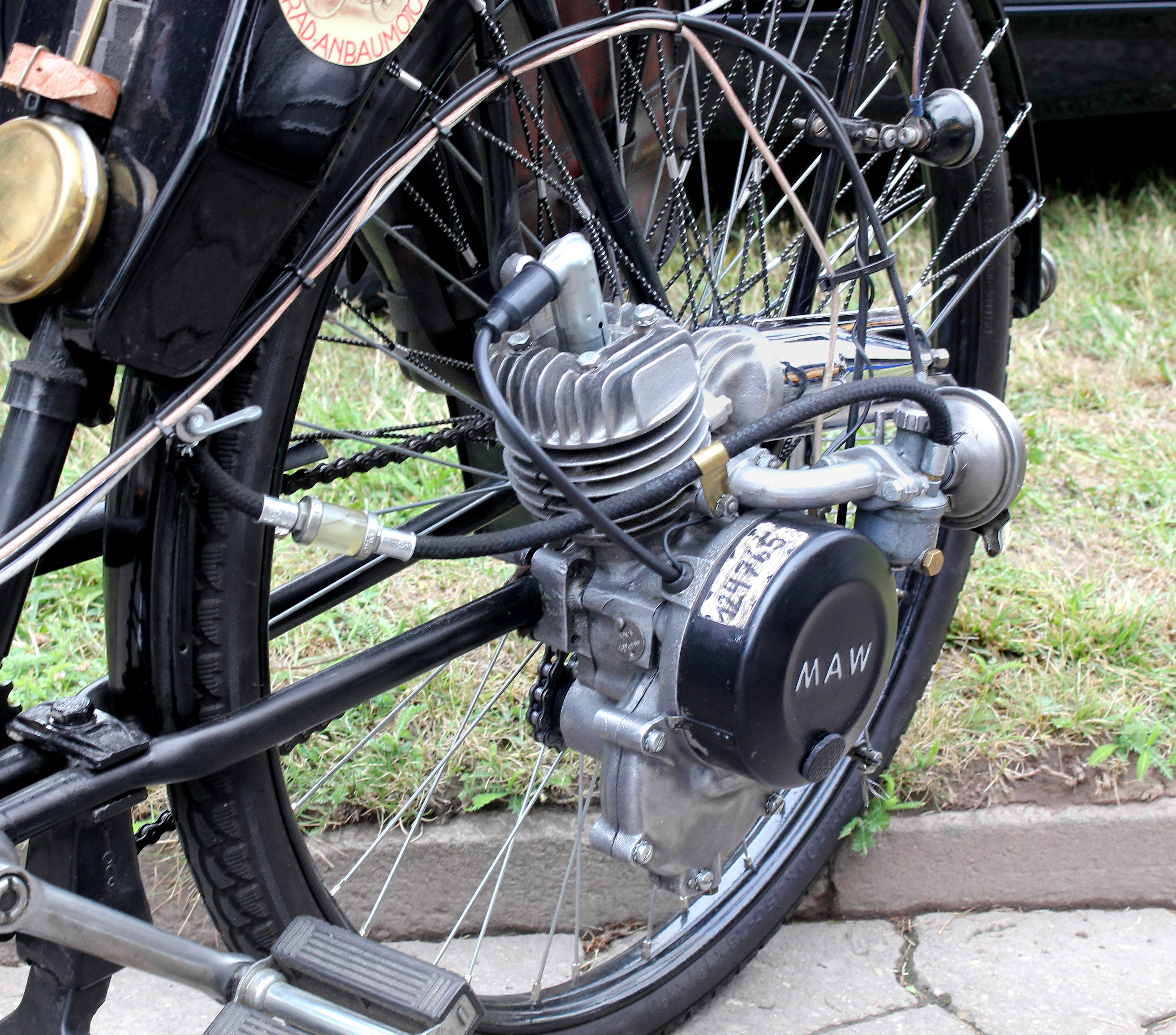 MAW-Fahrradhilfsmotor (Messgerät- und Armaturenwerke, Magdeburg), 49,5 cm³, 1,5 PS, Baujahr 1959